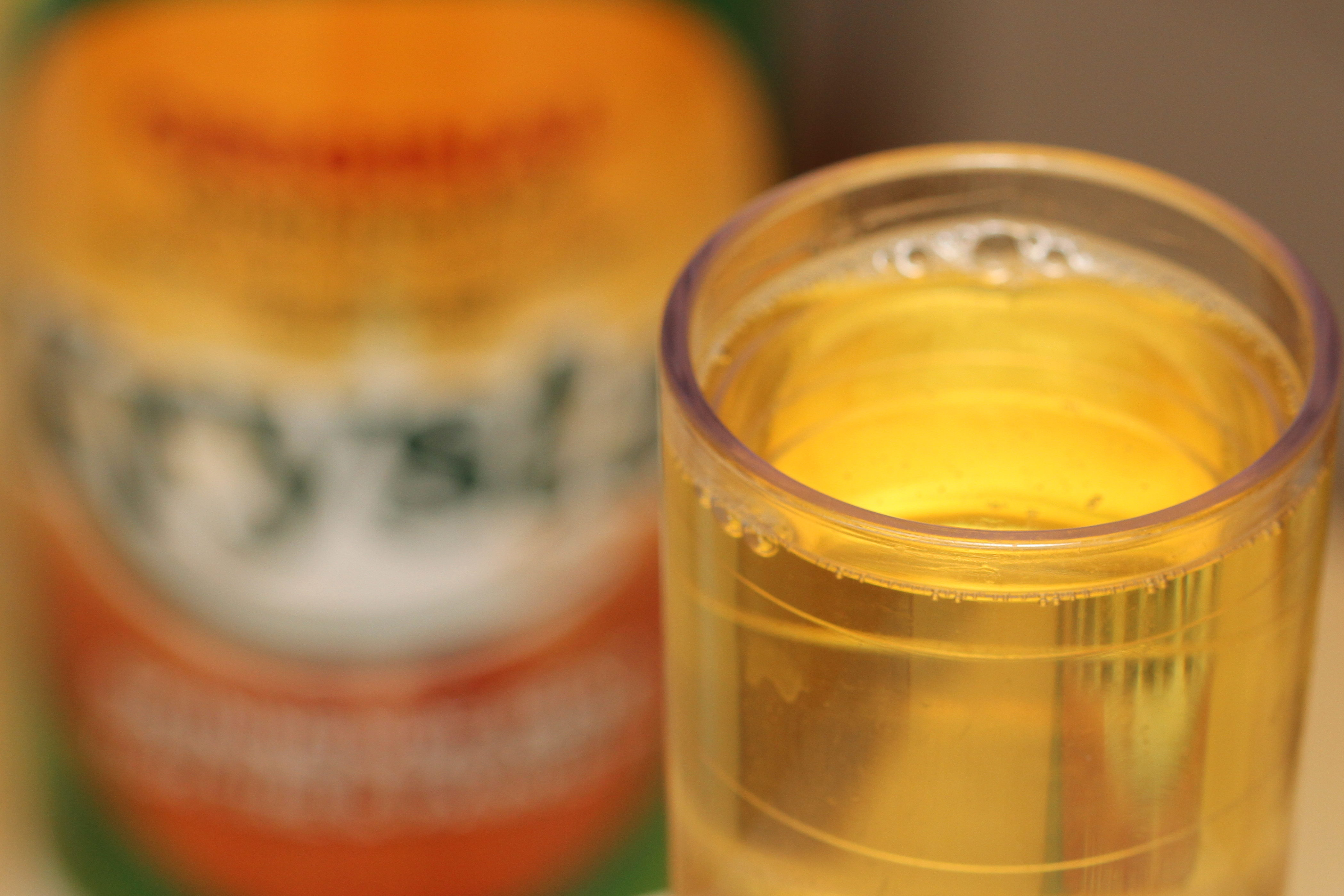 Grønnsåpe.